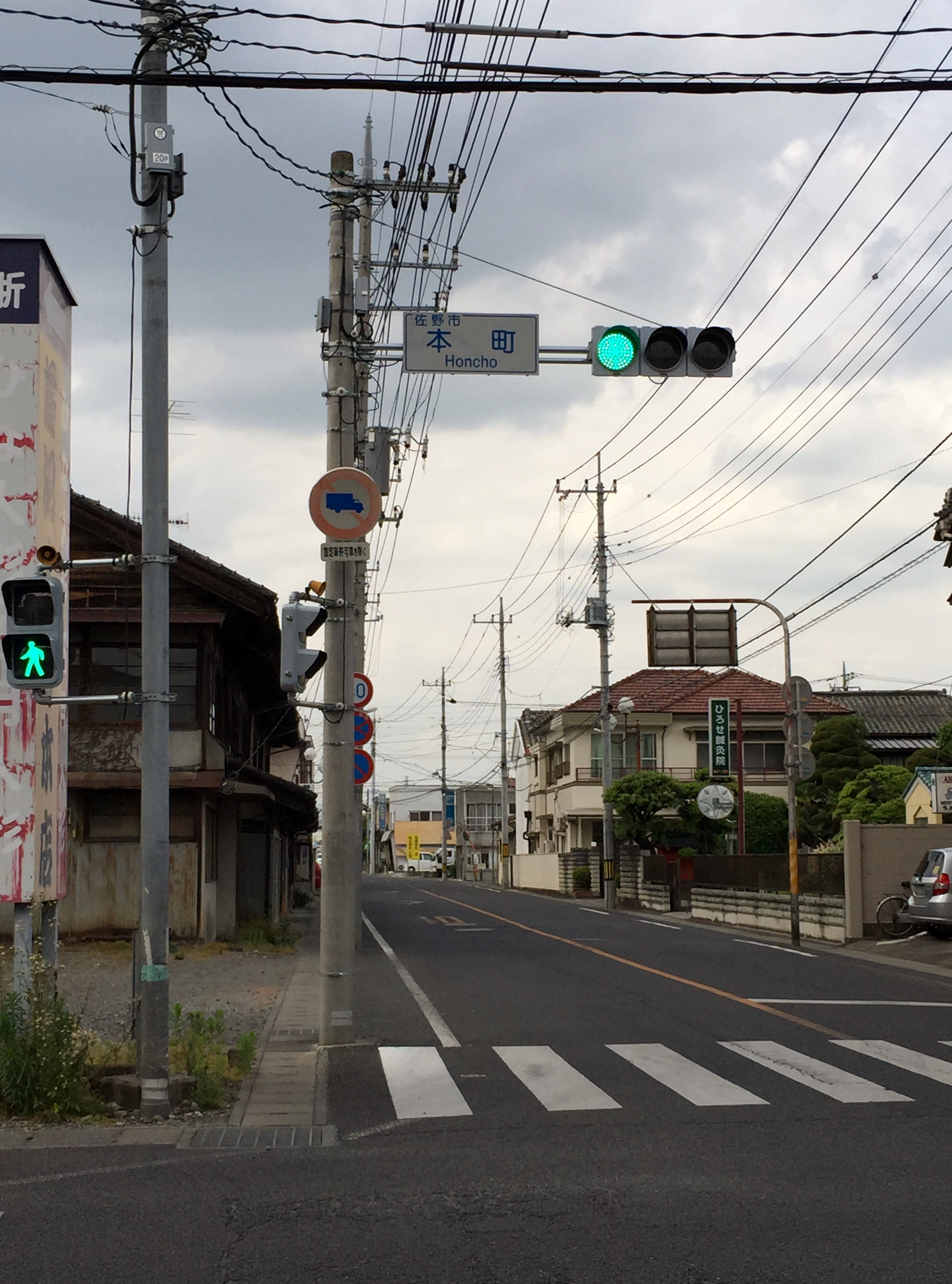 栃木県道237号 本町交差点